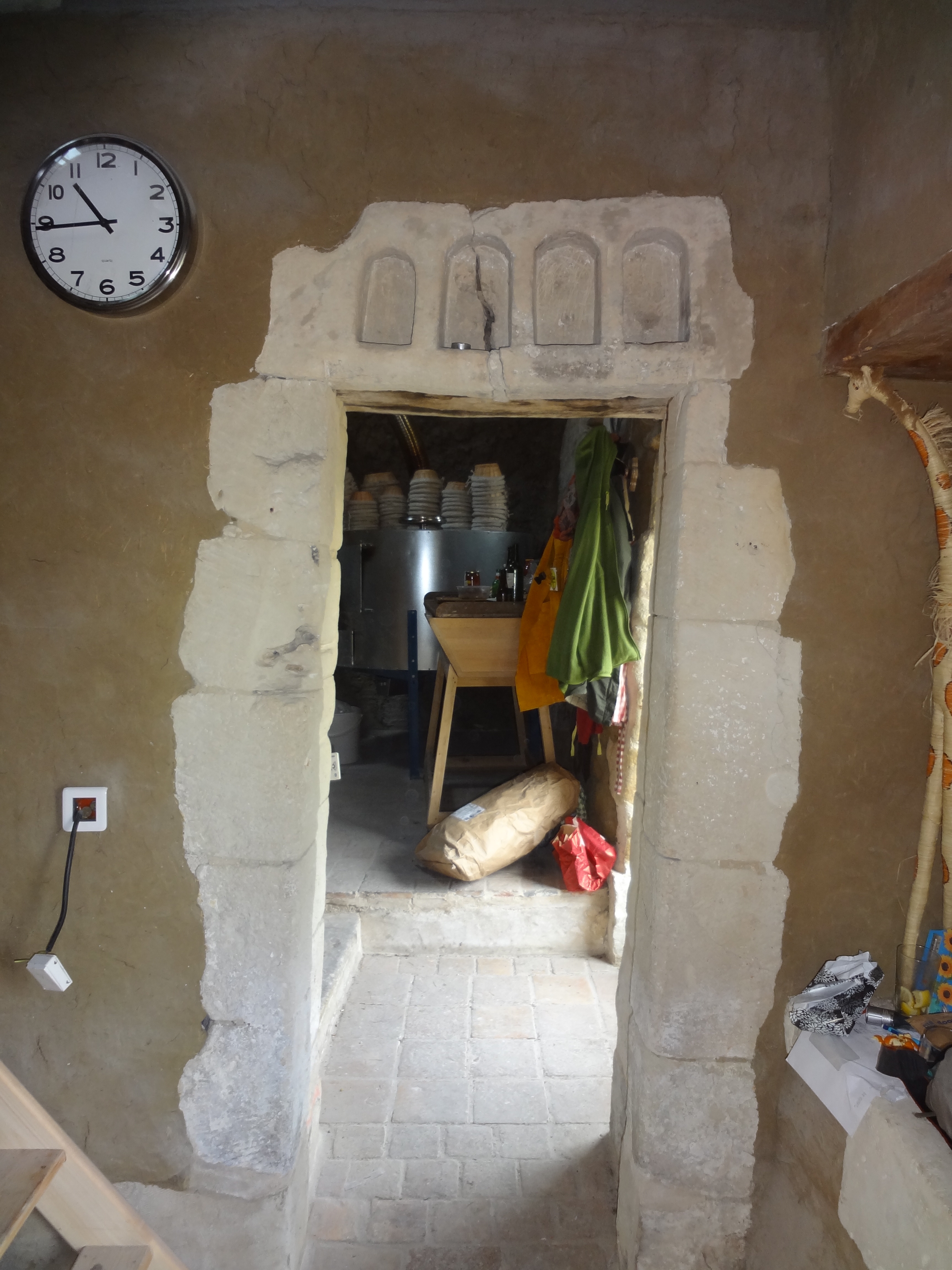 Pierre évidée de niches utilisée comme linteau.